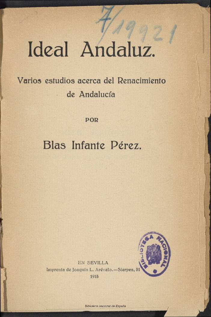 Portada de Ideal andaluz, de Blas Infante.